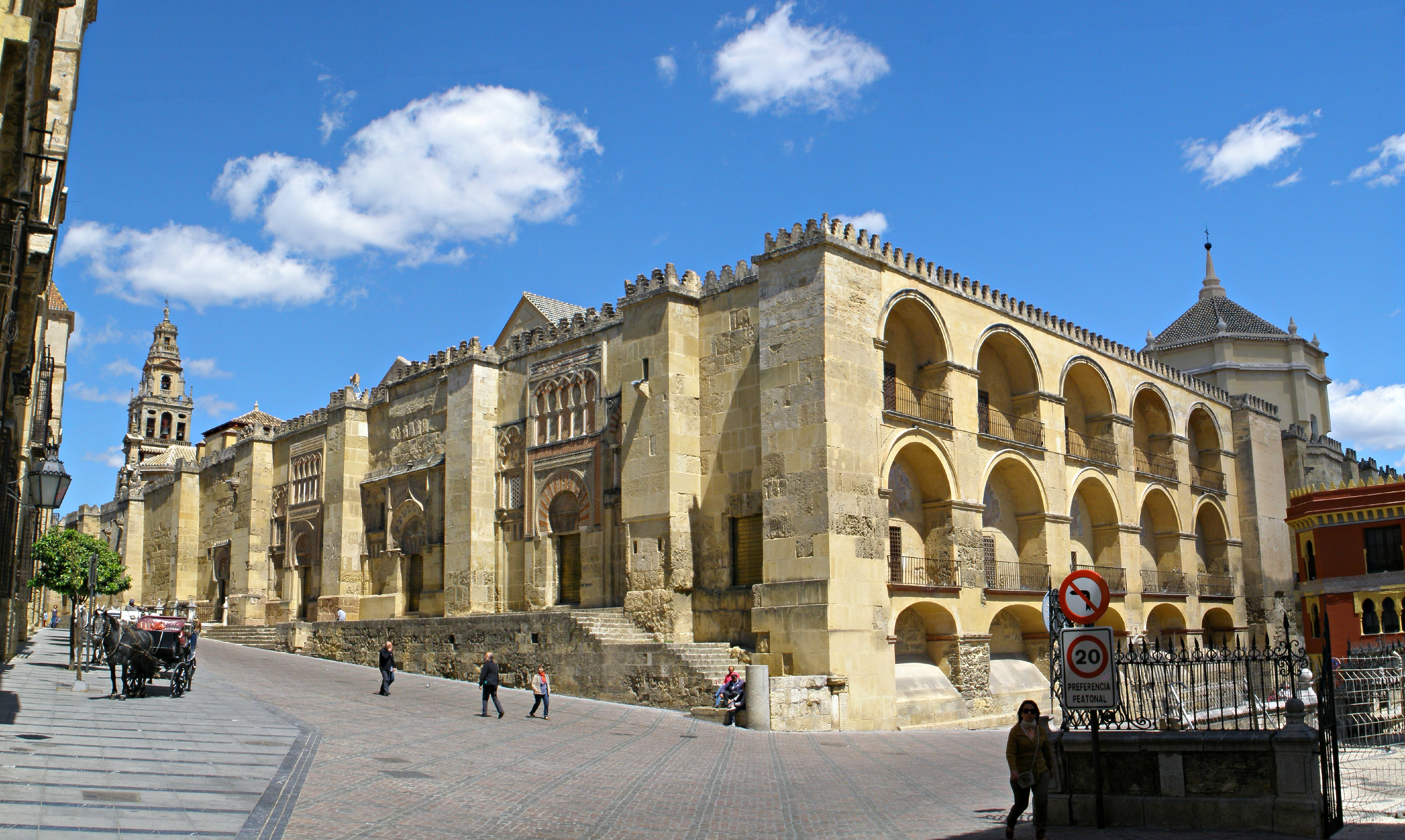 Mezquita de Córdoba, exterior del muro de la quibla.